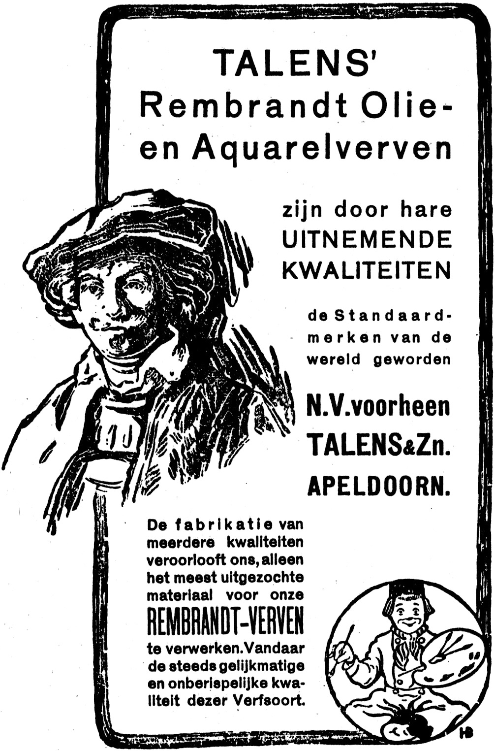 Anoniem (HB). Advertentie Talens N.V. Apeldoorn. Afkomstig uit De Stijl, 6e jaargang, nummer 8 (1924). De maker is onbekend (wel zijn initialen HB te zien), waardoor het auteursrecht verliep op 1-1-1995.